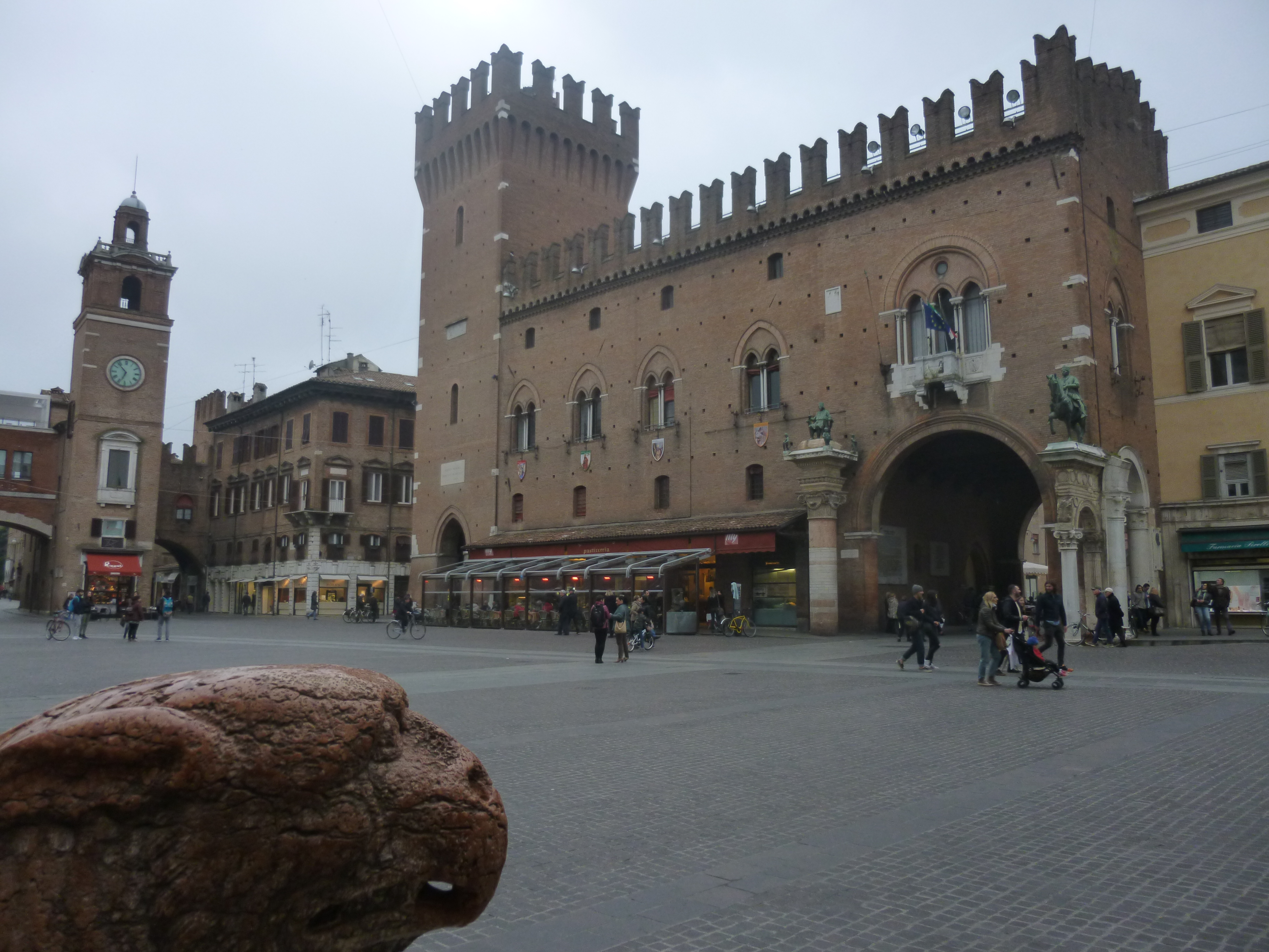 Palazzo Municipale This is a photo of a monument which is part of cultural heritage of Italy.